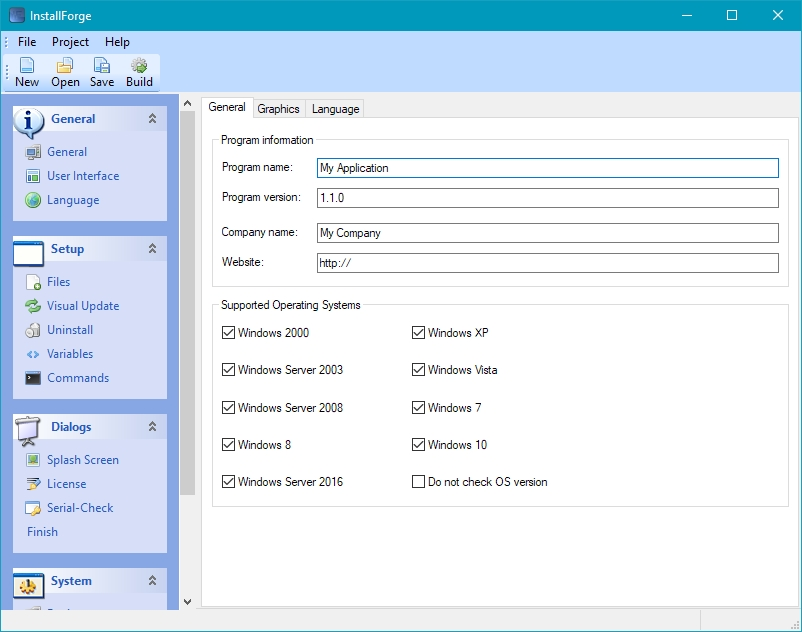 InstallForge